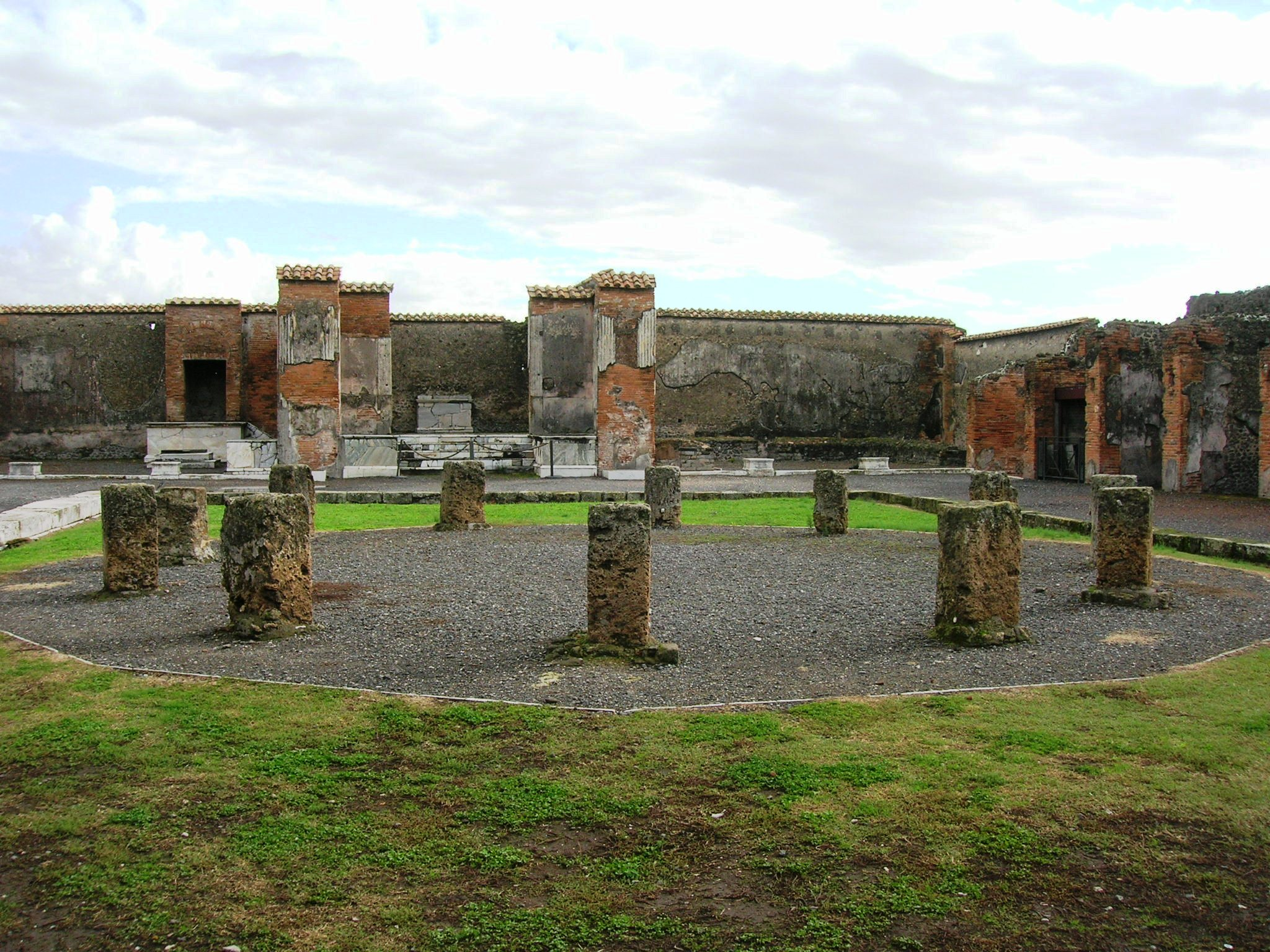 L'interno del Macellum